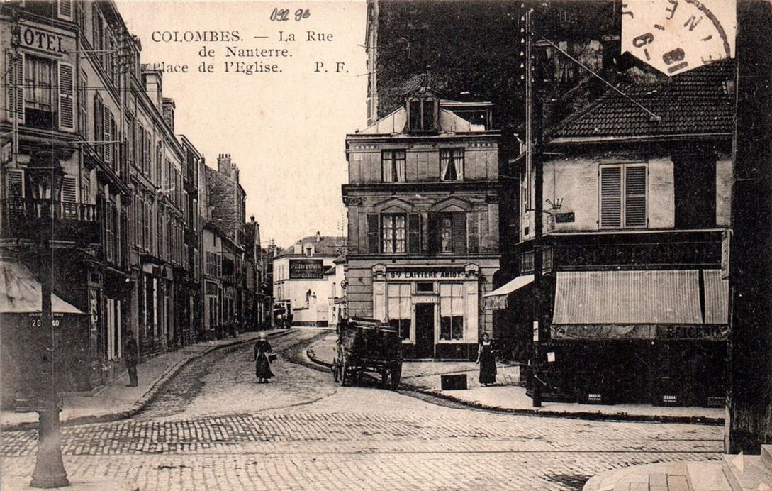 Colombes.Rue de Nanterre.Place de l'Église